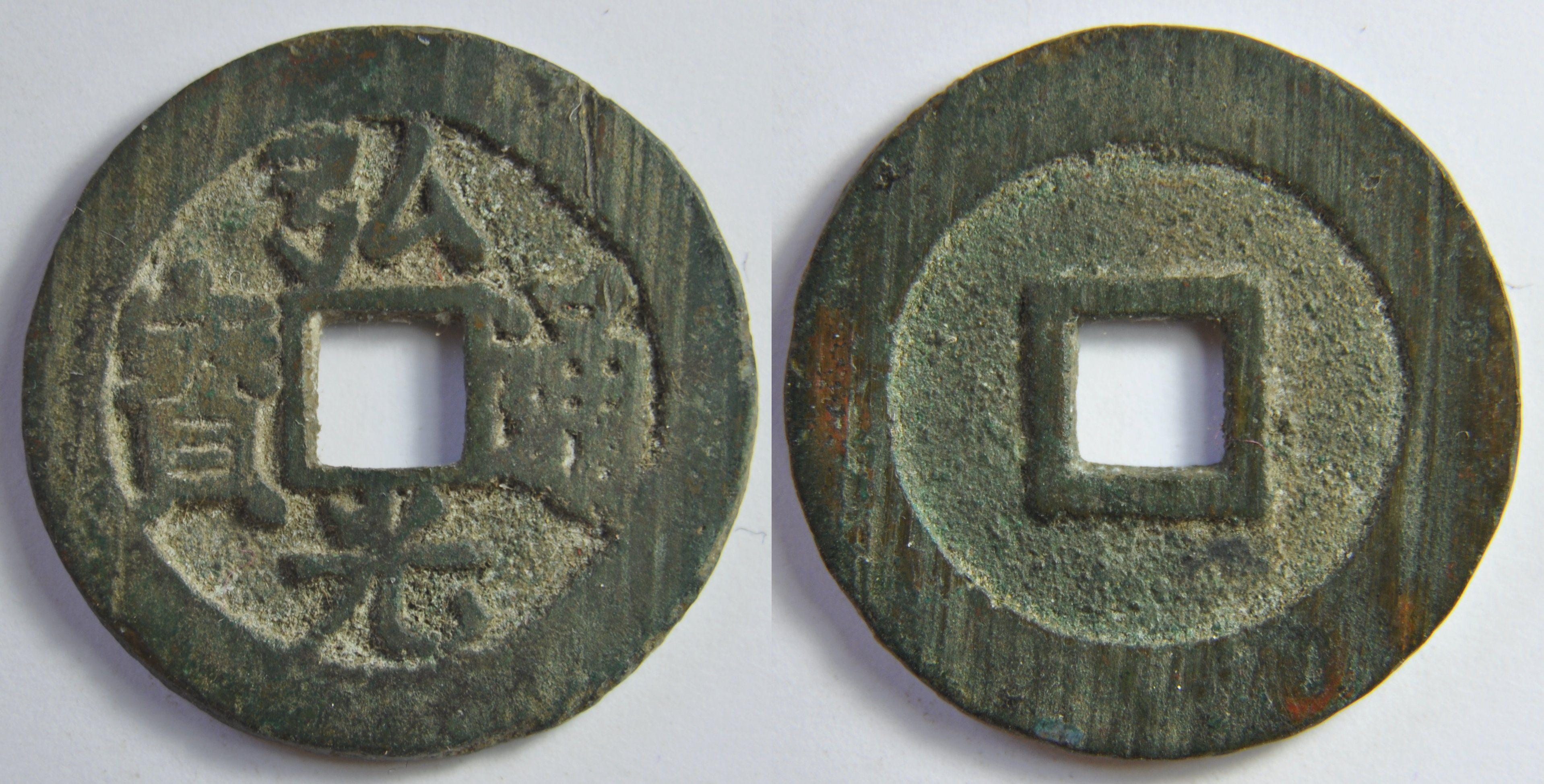 Une monnaie en bronze d'une sapèque (1 cash) du prince de Fu, petit-fils de l'empereur Ming Wanli (1573-1620) qui devient le nouvel empereur Ming à Nanking à la mort par suicide de l'empereur Ming Chongzhen (1628-1644) en 1644. Il prend le nom d'ère de Hong Guang (1644-1645). Les Mandchous prennent Nankin en 1645 et le prince est capturé et emmené à Pékin où il meurt en 1646. C'était un amateur de boisson. A/ Hong Guang tong bao R/ vide Dimension : 25,5 mm Poids : 5 g. Cette monnaie a été fabriquée à Nanking. Indice de rareté : 13 (Très commune) (d'après D. Hartill)